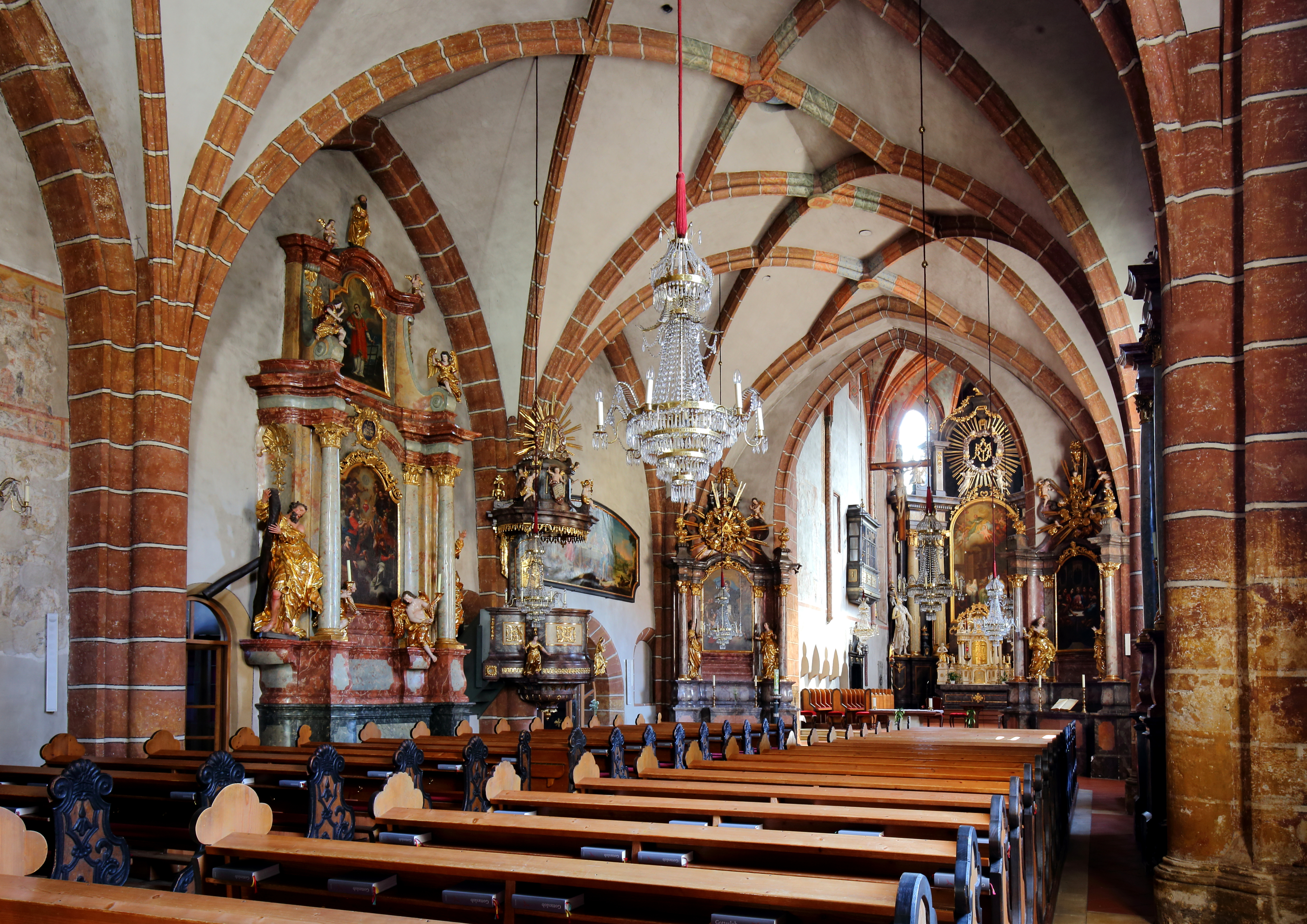 Innenansicht der Stadtpfarrkirche Bruck an der Mur.